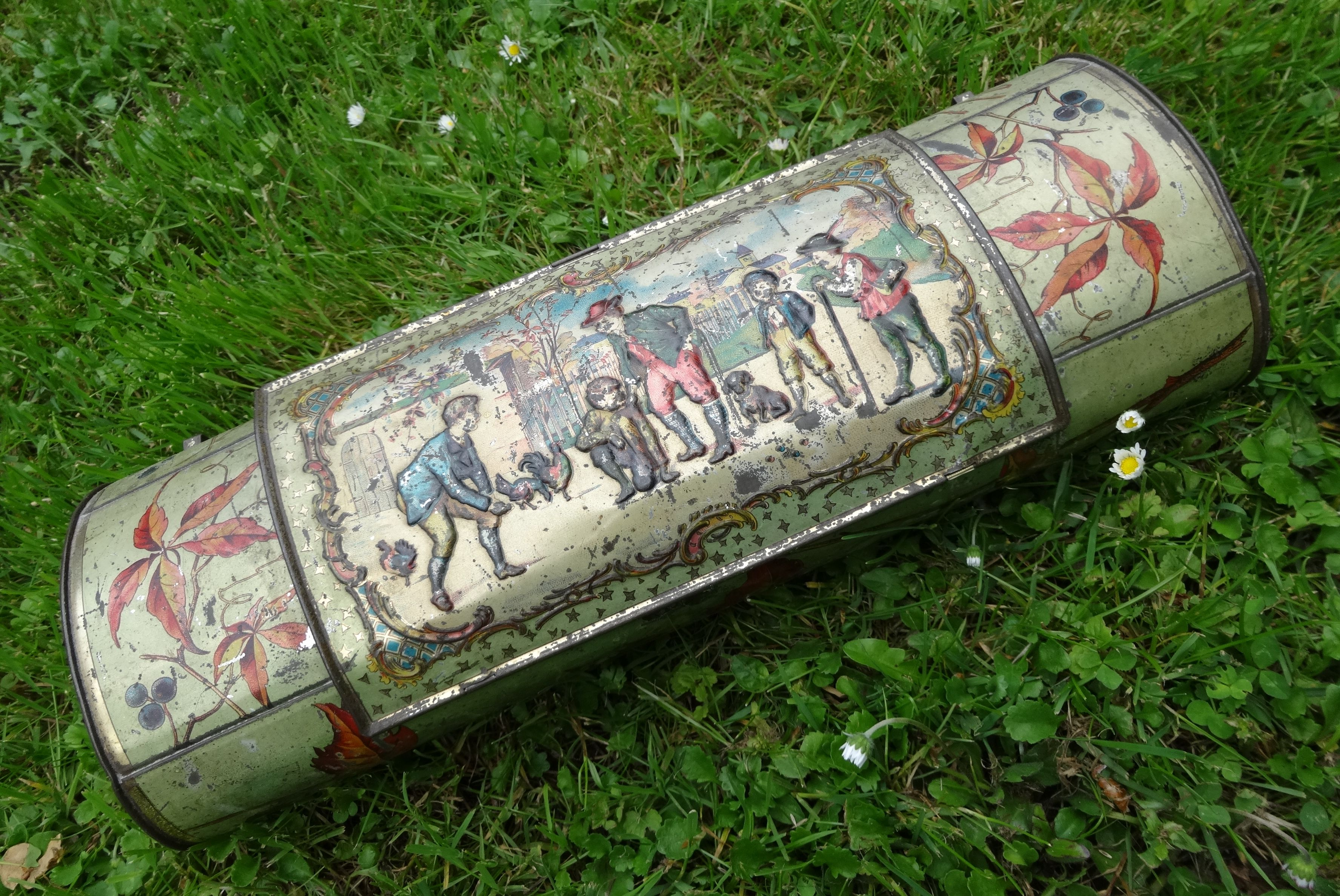 Vasculum ou boîte d'herborisation, modèle pour enfant (v. 1900) dimensions :38 x 14 x 10 cm, vue de la face supérieure